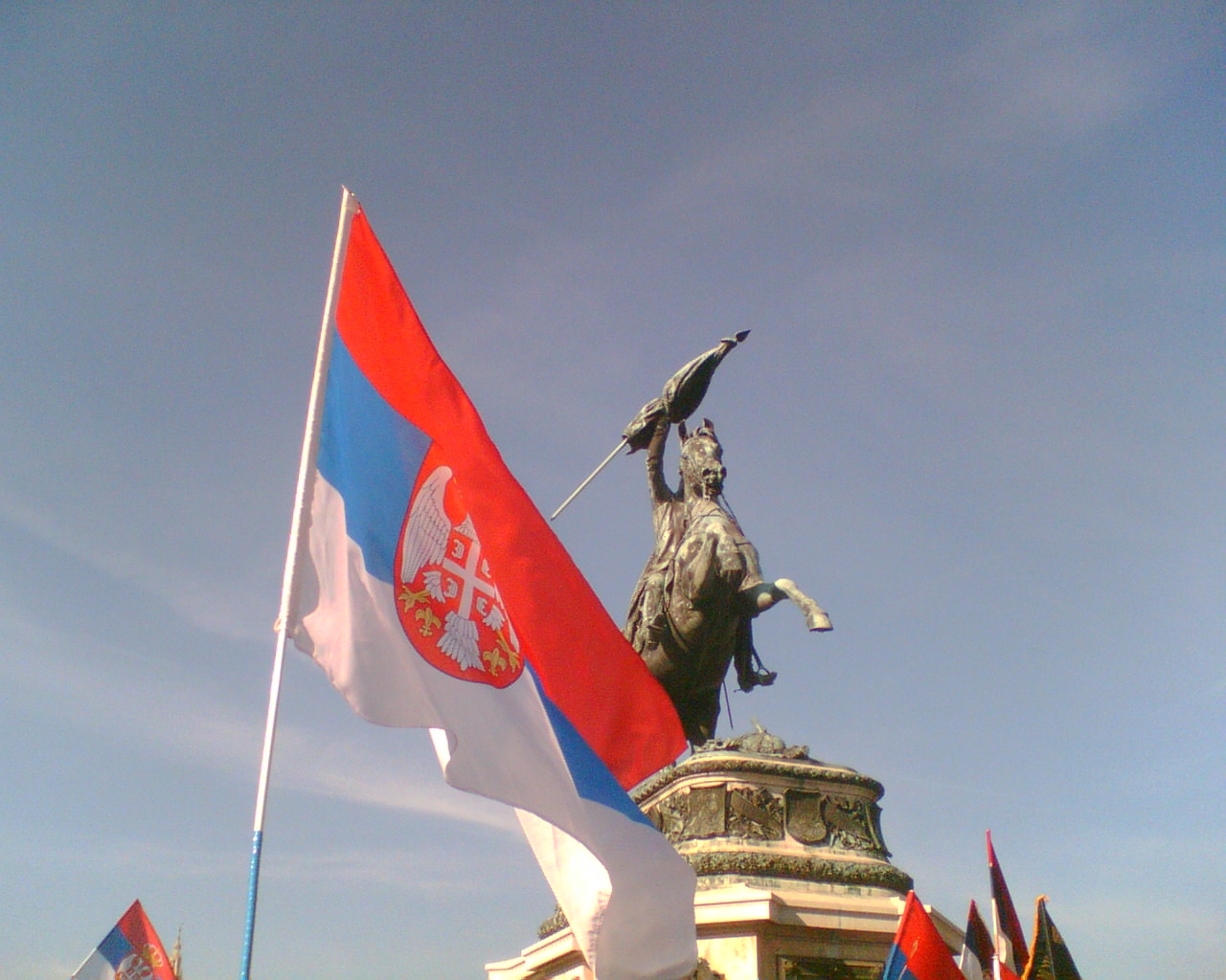 Demo "Kosovo je srbija" in wien am 24.Februar 2008